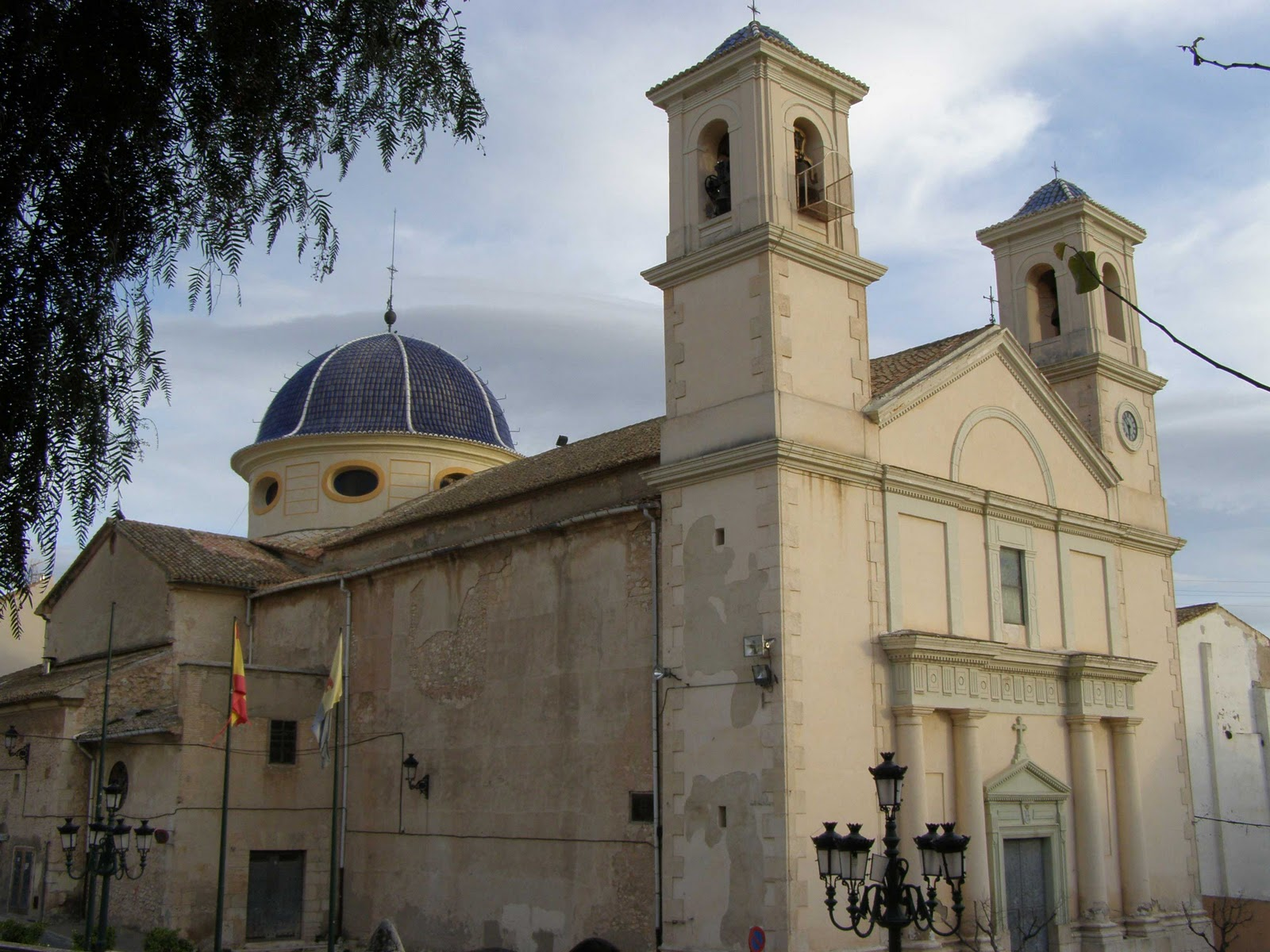 Iglesia de la Transfiguración del Señor en Ibi, Alicante.